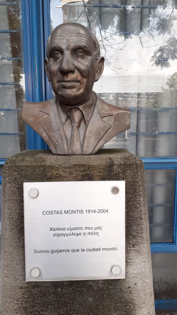 Efigie de Costas Montis en la Facultad de Filosofía y Letras de la Universidad Nacional Autónoma de México. Costas Montis Effigy. School of Philosophy and Letters. National Autonomous University of Mexico. Mexico City.